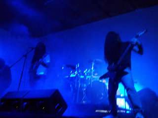 Una fotografía tomada por mí de Kraptor en vivo, en San Luis Potosí, México.